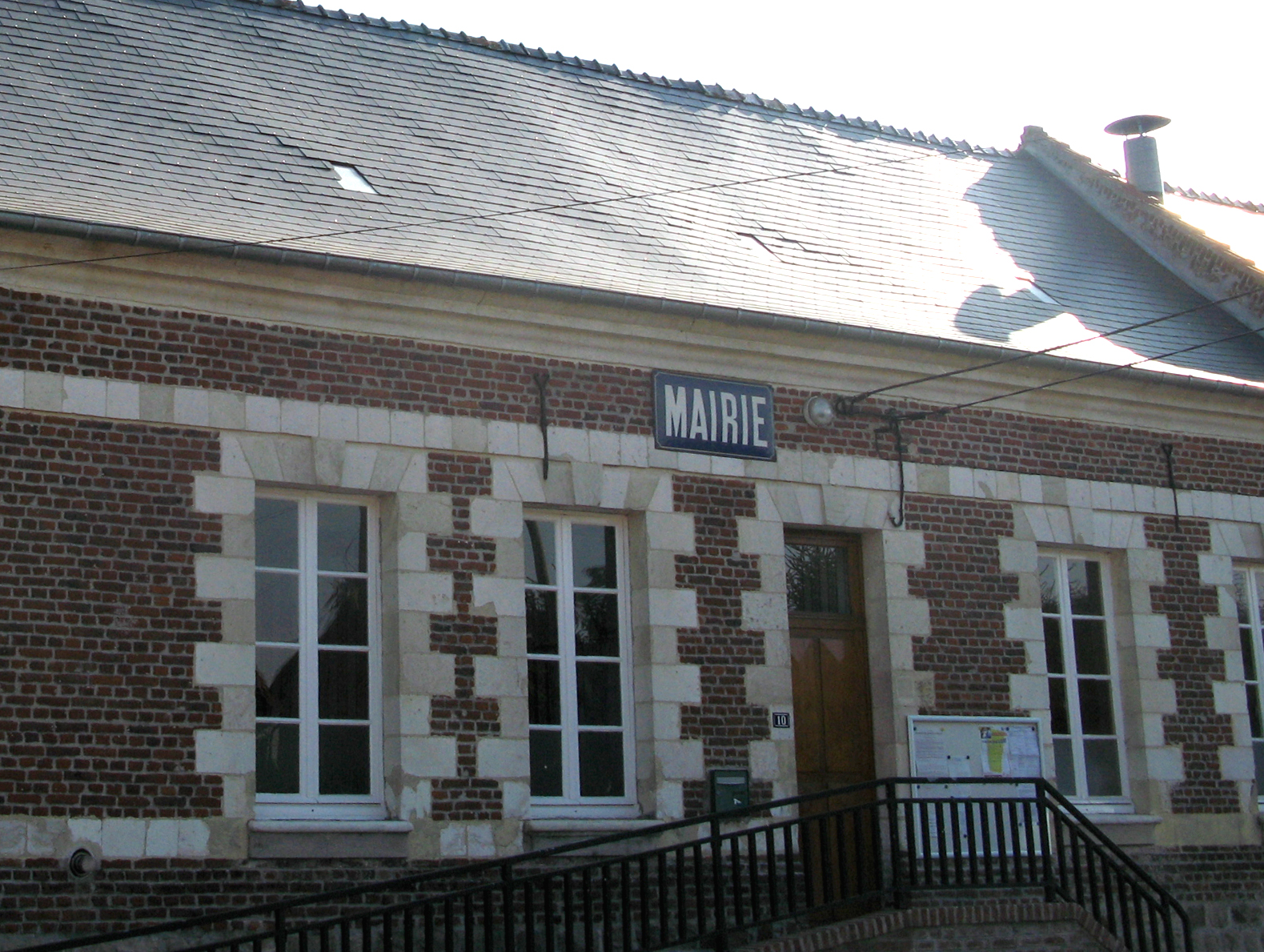 Macquigny (Aisne, France) - La mairie. (Le soleil de face a provoqué des reflets parasites importants.)